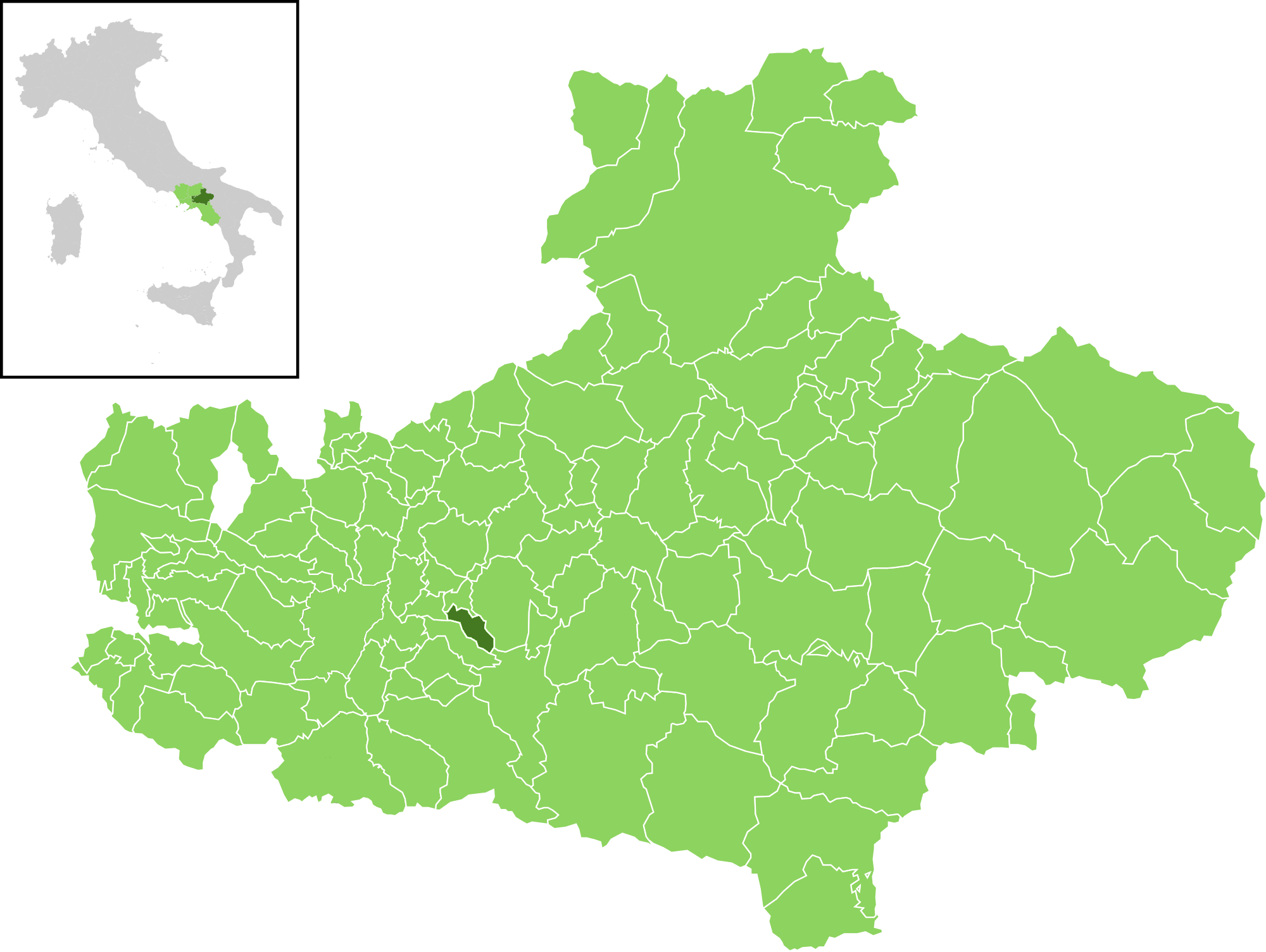 Posizione del comune all'interno della provincia di Avellino